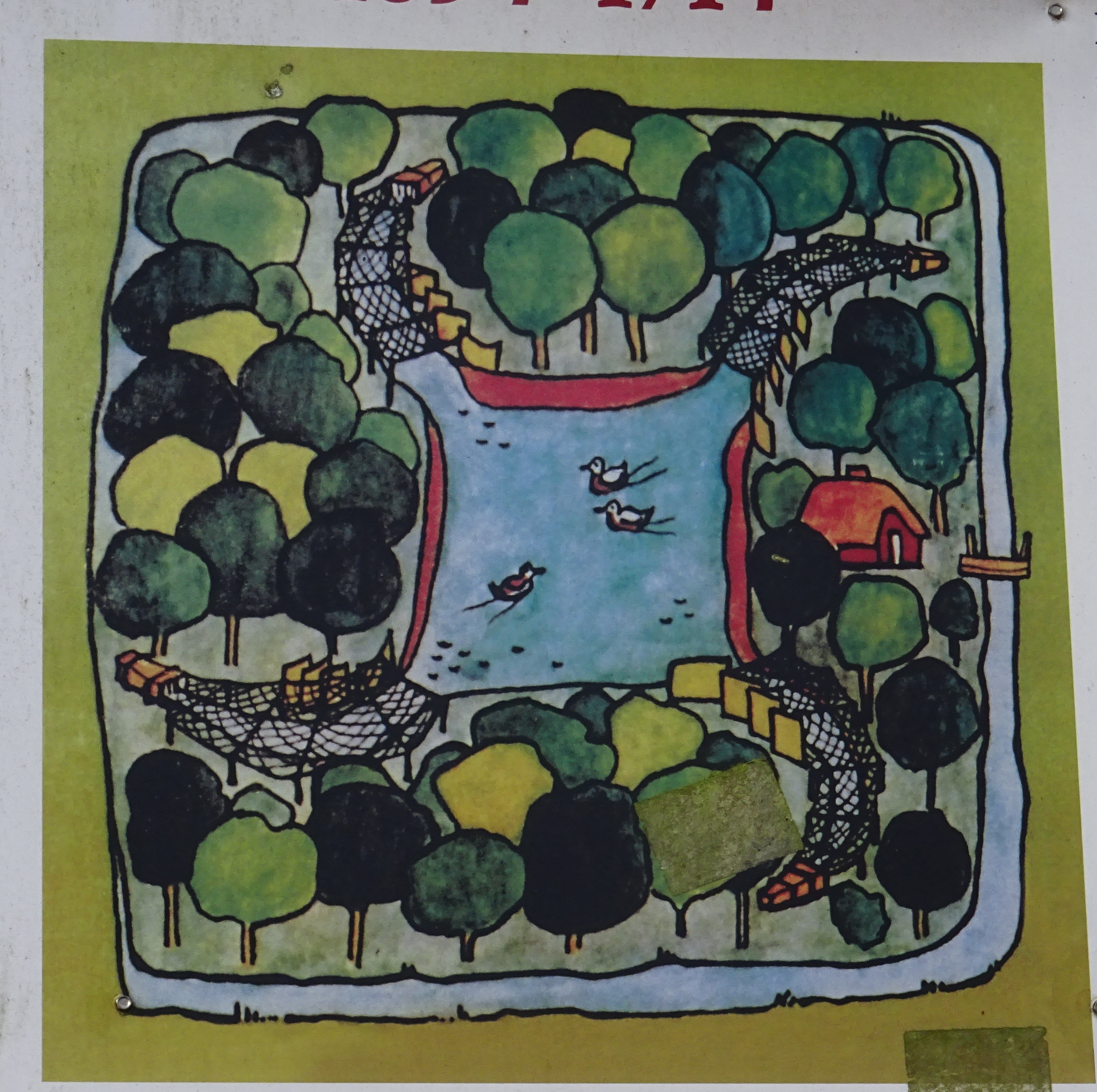 ntenfängerteich südlich von Golm, Stadt Potsdam, am Rand von Wildpark-West, Kulturdenkmal.Schema.